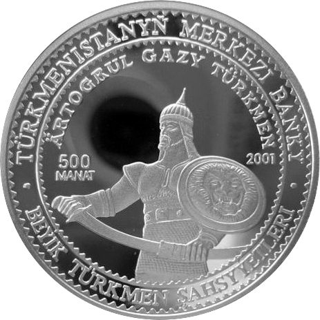 Памятная монета Туркменистана